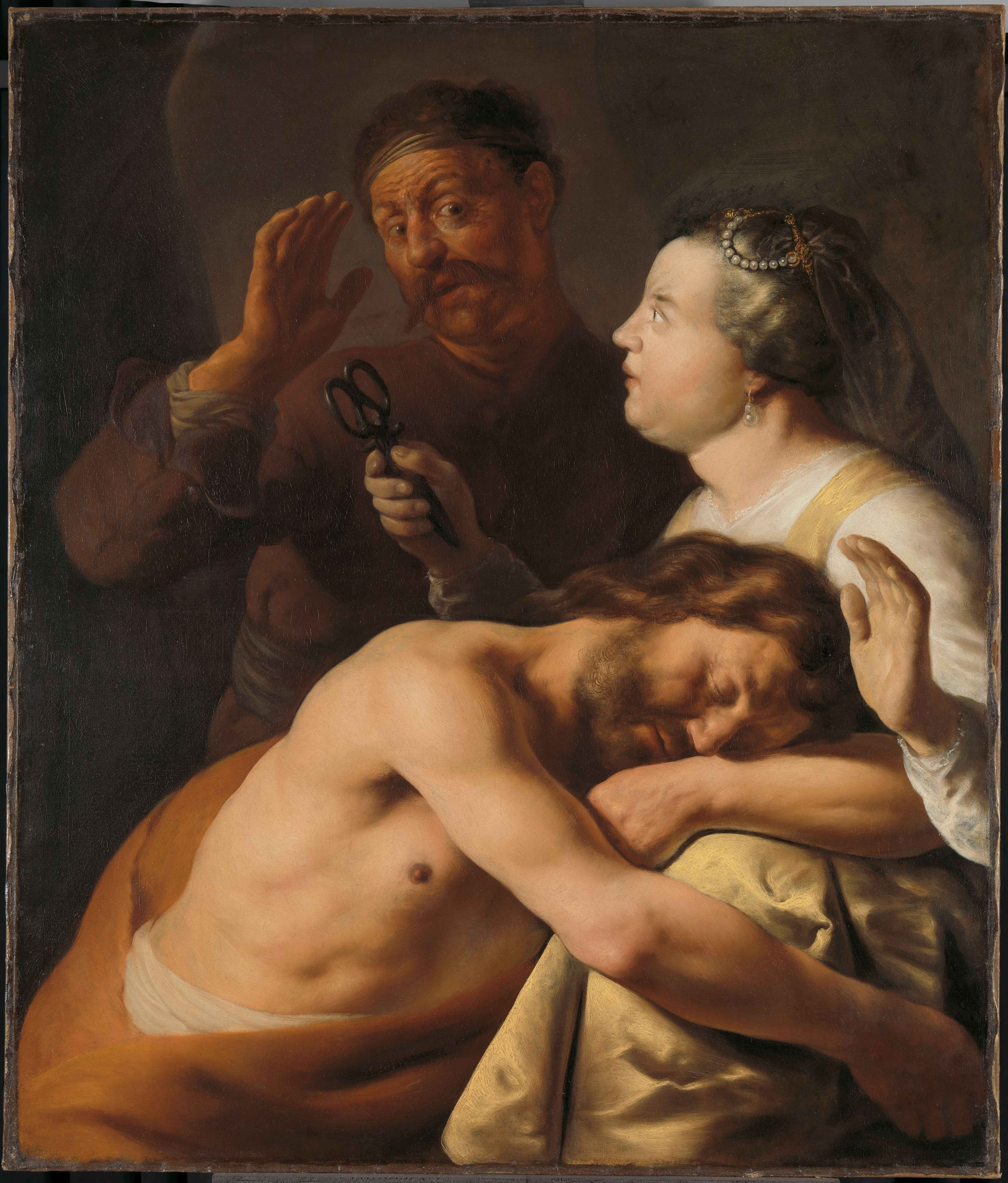 Simson en Delila. Simson is op de schoot van Delila in slaapgevallen. Delila reikt een verschrikt kijkende Filistijn een schaar aan.